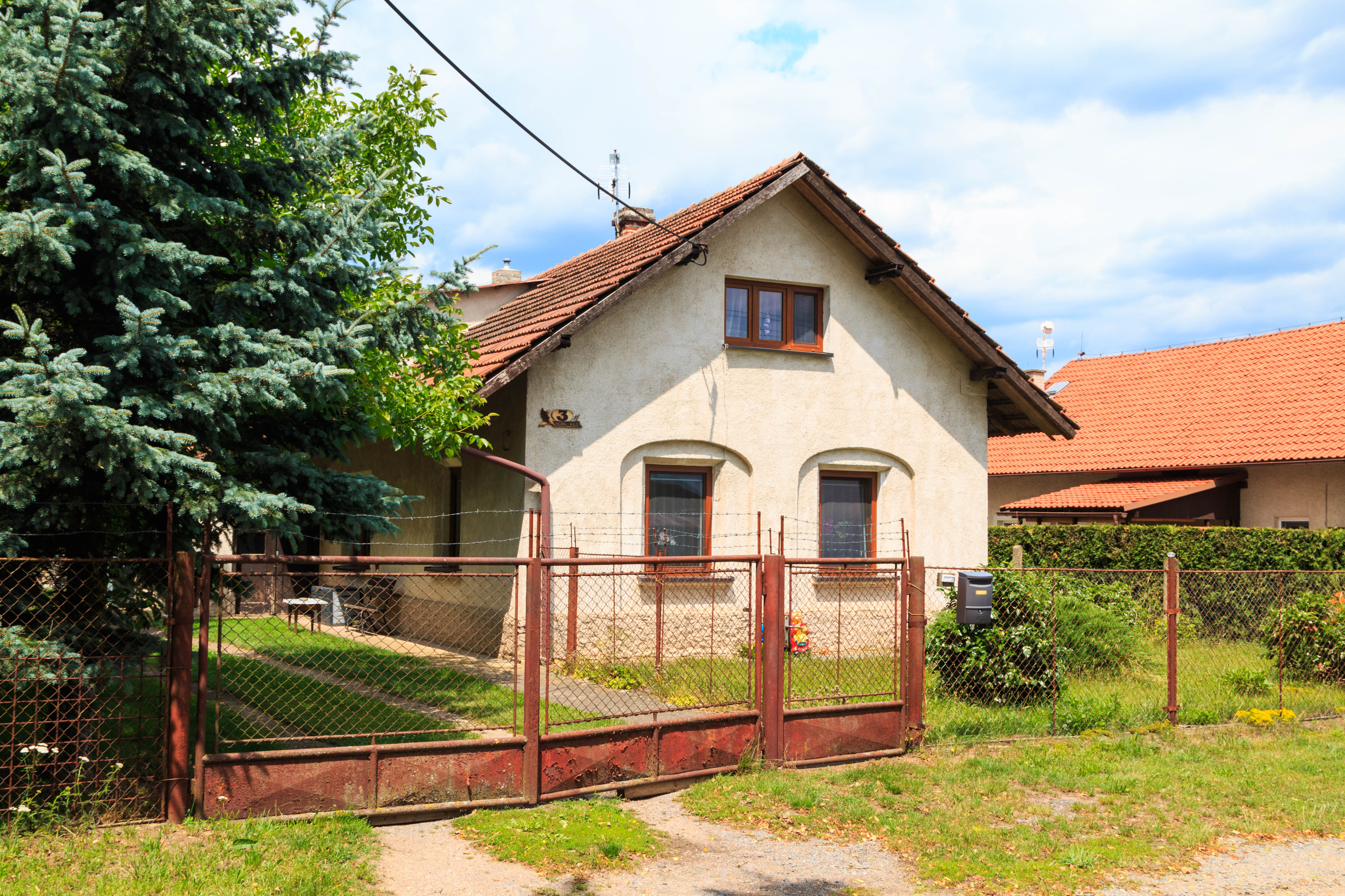 Nová Ves (Choceň) čp. 3